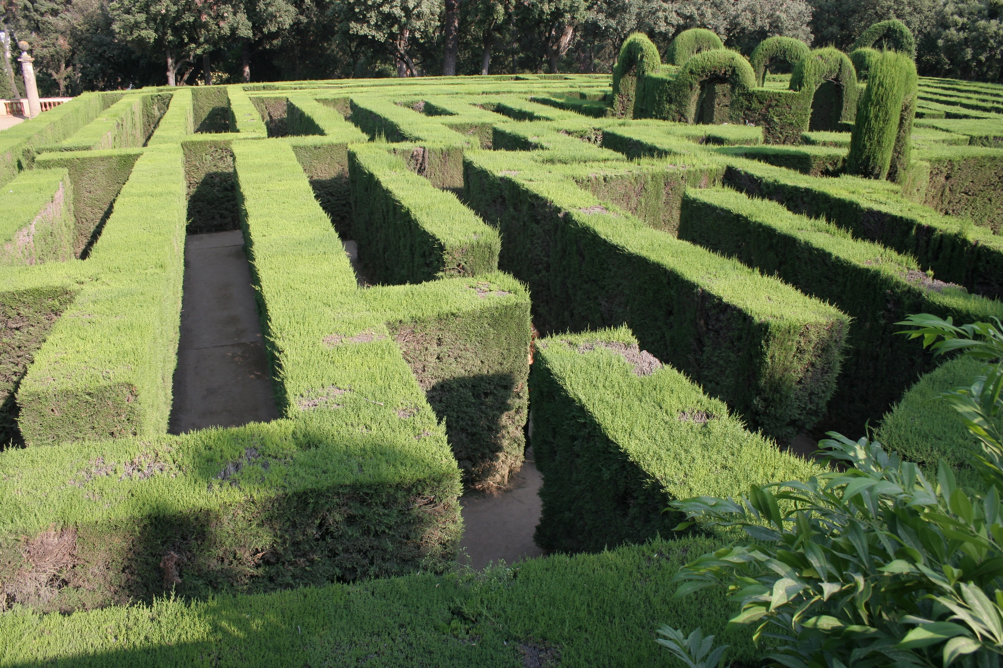 Hedge maze, Jardines del siglo XVIII, Barcelona